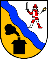 Gemeinde Muhr, Salzburg: Ein Schild, schräg geteilt von einem doppelten Wellenband in Blau, darüber im linken Feld in Silber ein Mann mit rot-silber verwechselten Kleidern, rechts ein Schwert, links einen goldenen Ring mit Rubin haltend, darunter im rechten Feld in Gold ein Blahhaus in Schwarz. (Blahhaus meint eine kleine Hochofenanlage)